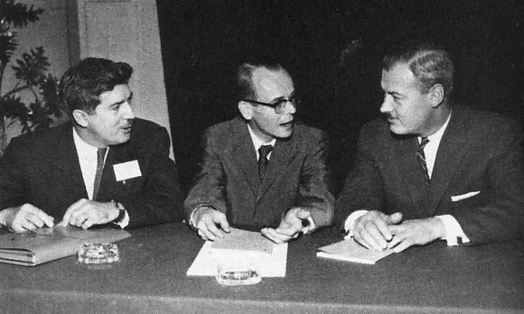 Jean Marchand et Gérard Picard (CTCC) en discussion avec Roger Provost (FTQ)